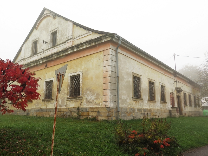 Zájezdní hostinec, Soběraz 46, Soběraz.